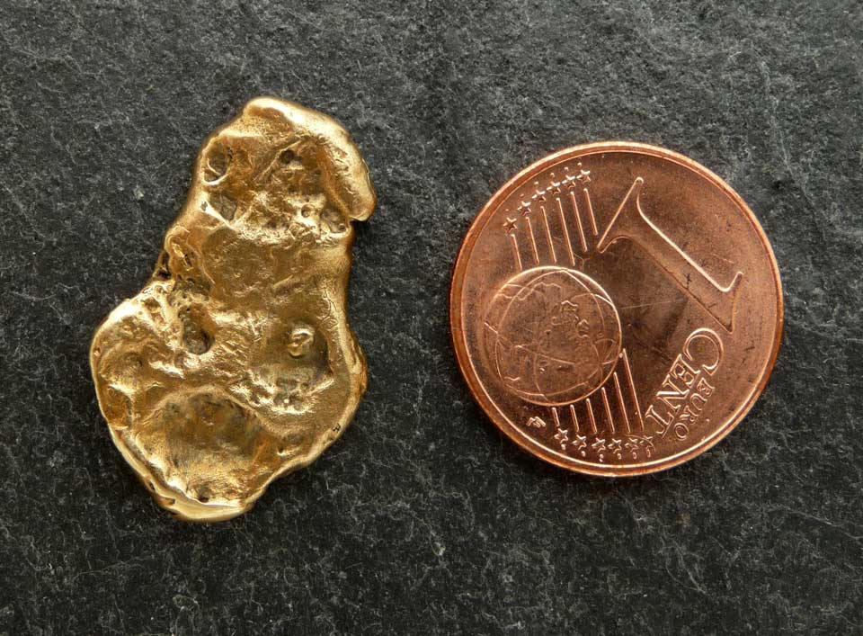 Goldnugget; 2,0 cm hoch und 5.265 g schwer; gefunden von Chr. Kreibich im Frühjahr 1999 am Hädderbach.